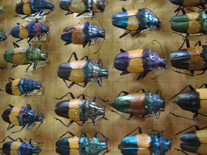 Charmallaspis pulcherrima (Perty, 1832) det. F. Vitali